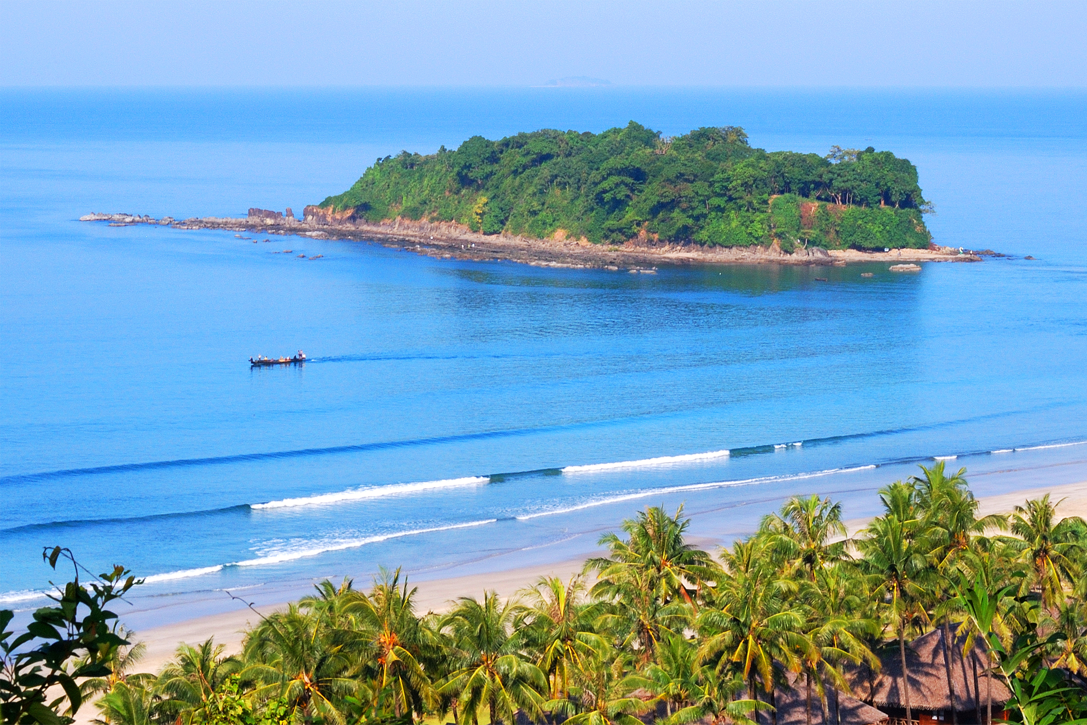 မြန်မာဘာသာ: ချစ်သူများကျွန်း၊ ငွေဆောင်ကမ်းခြေ